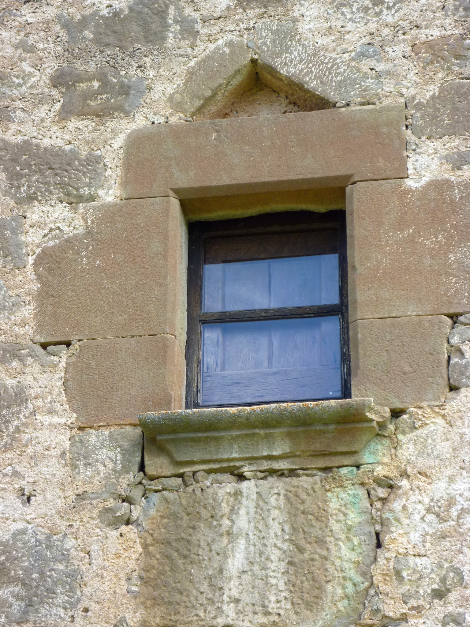 Mas Carbonells (Torà): detall d'una finestra